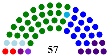 composicion del Congreso en ese periodo